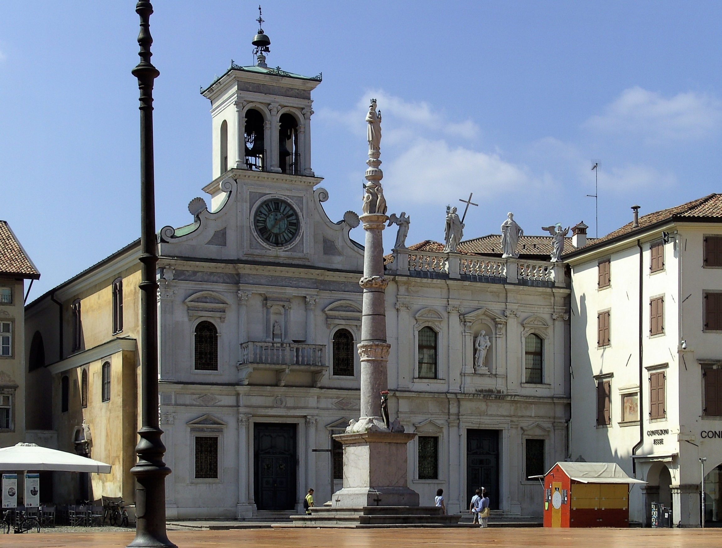 Piazza San Giacomo a Udine , Italia.